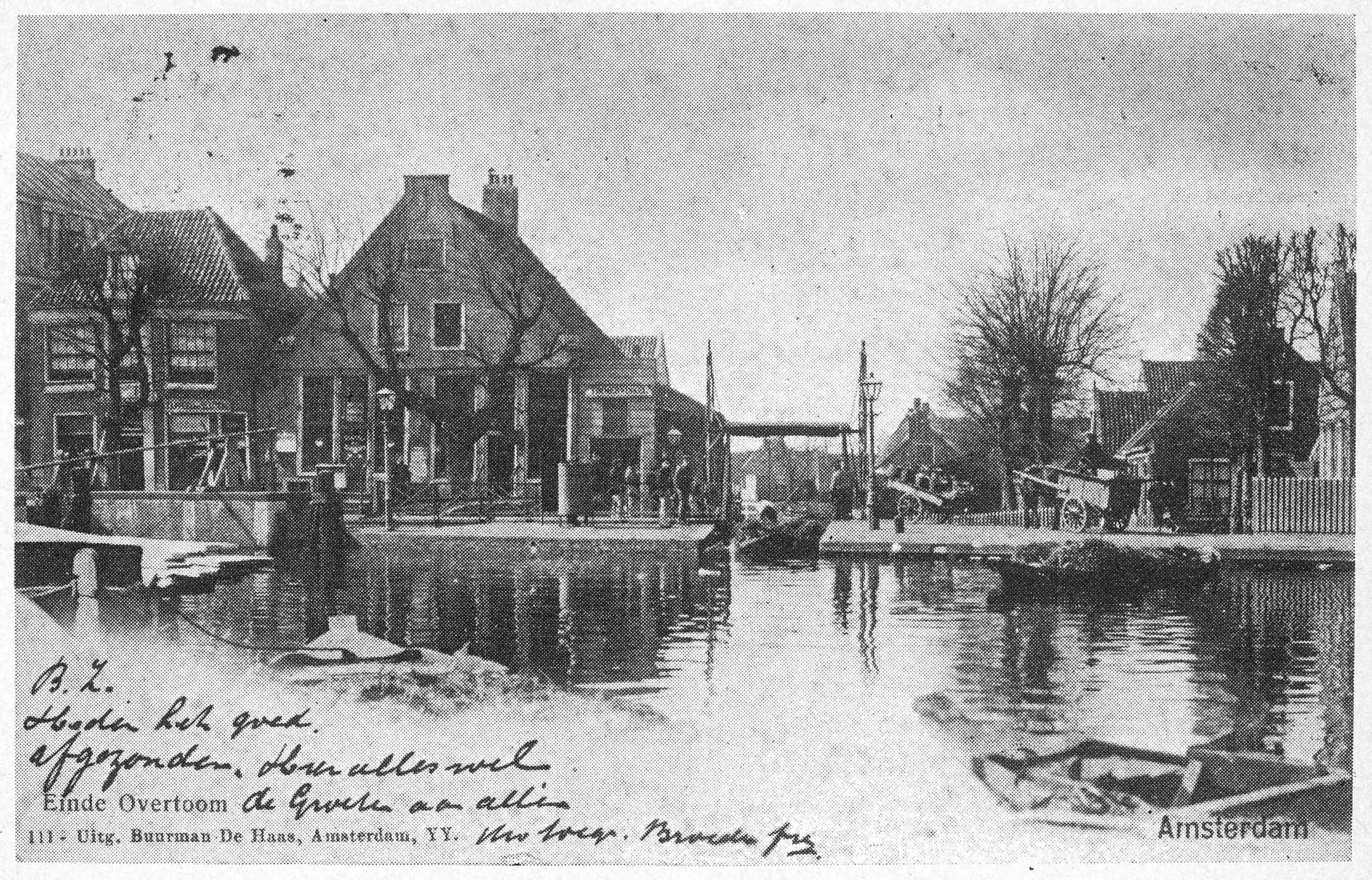 Photographed in Amsterdam between 1900 and 1914.